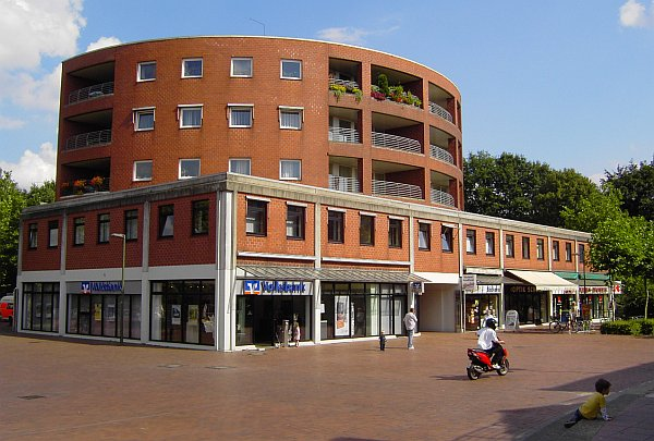 Wulfener Markt, Rundbau von Josef Paul Kleihues